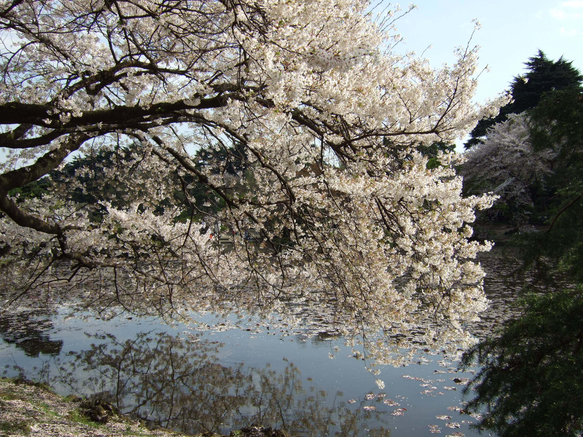 Sakura blossoms at Shinjuku Park in Tokyo